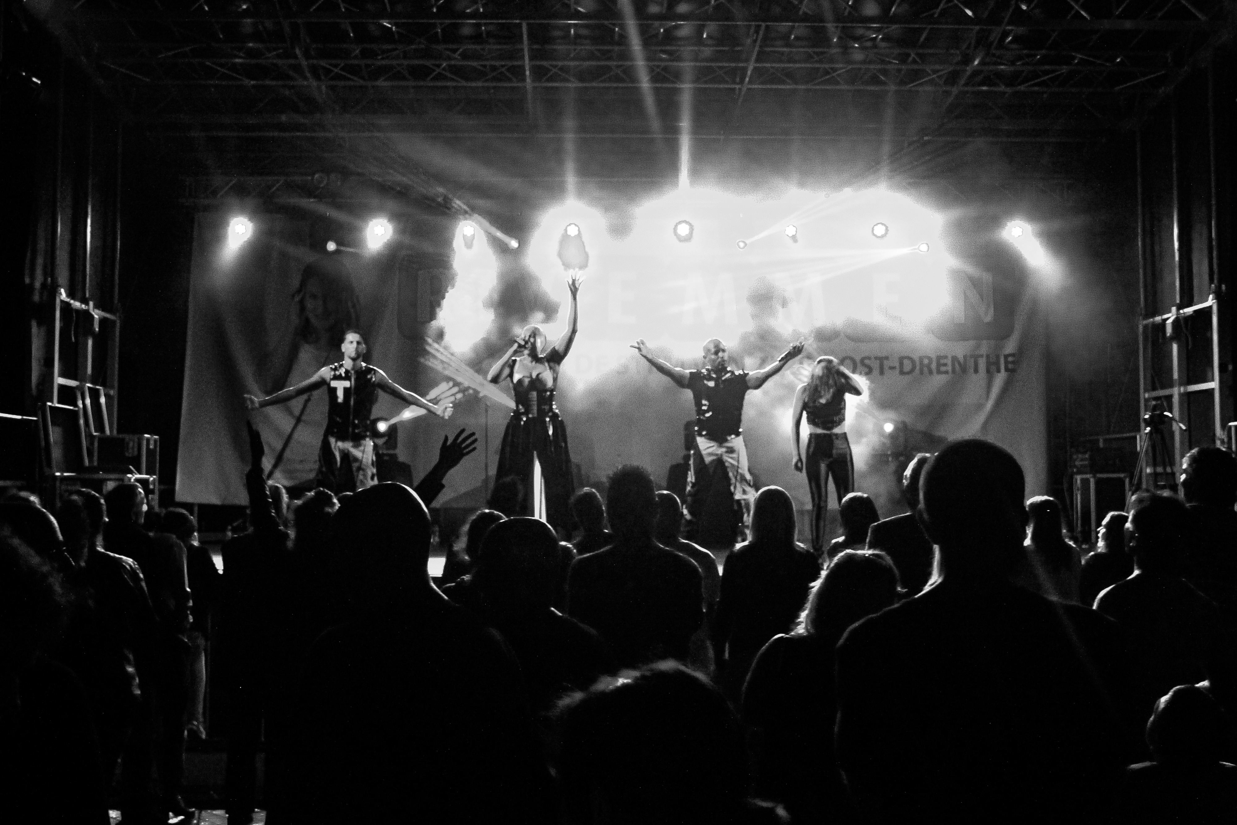 T-Spoon Reloaded tijdens de Gouden Pijl in Emmen in 2015